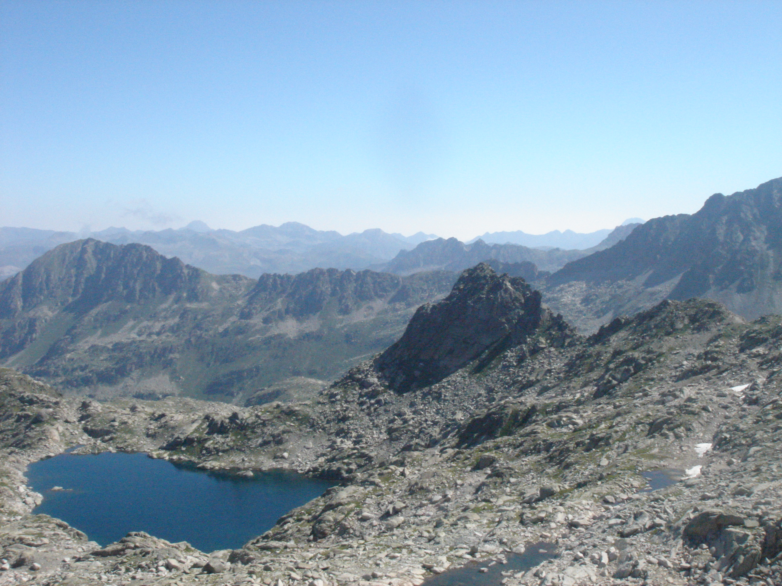 Vista del Estanh Gelat e Tuc de Pòdo